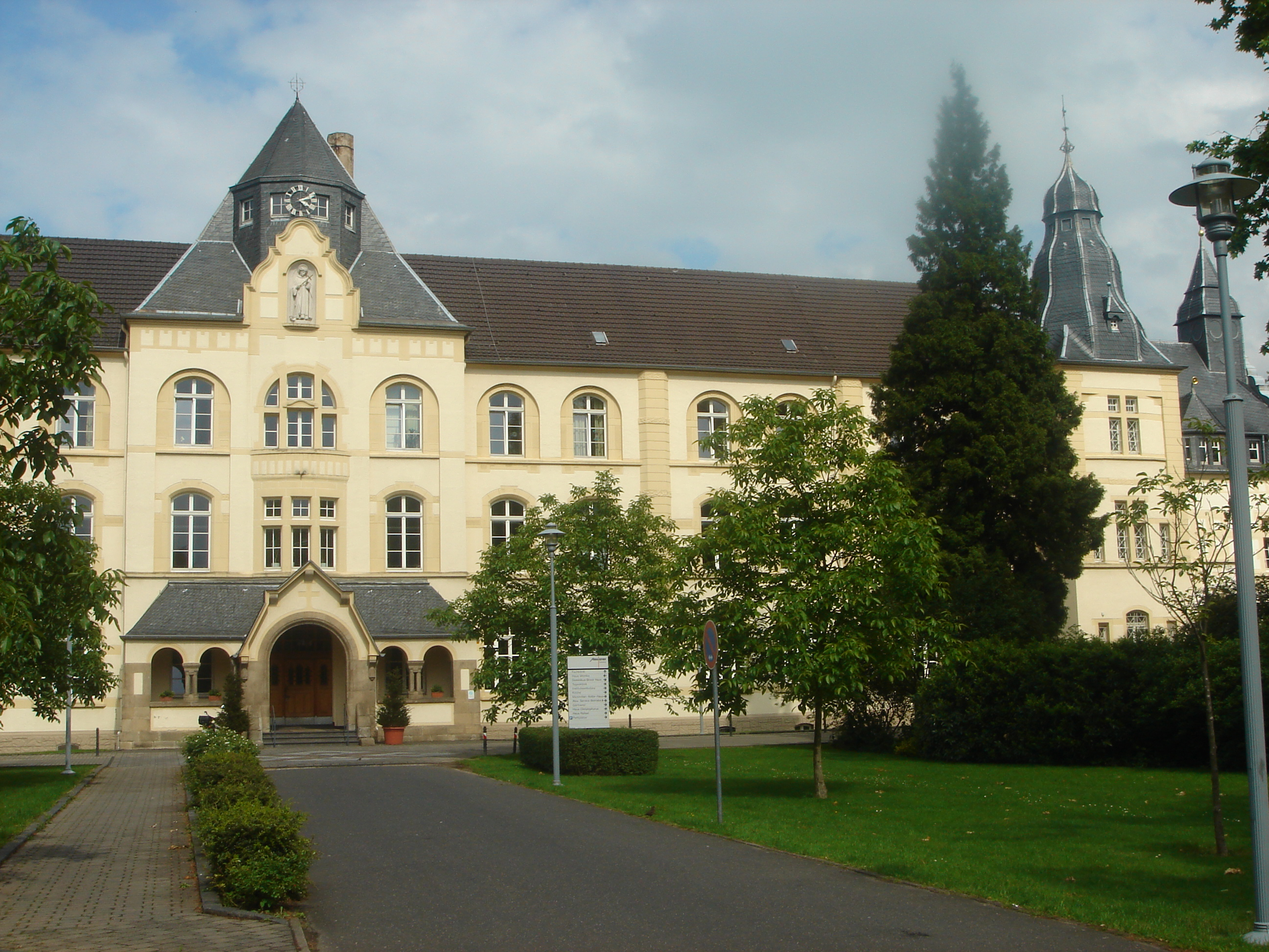 Alexianer Hospital Cologne